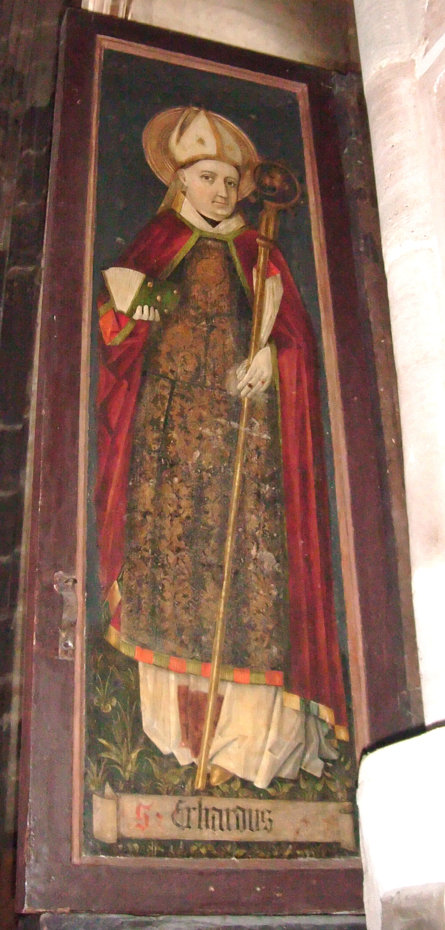 Erhard von Regensburg, gotische Tafelmalerei, St. Lorenz Kirche, Nürnberg